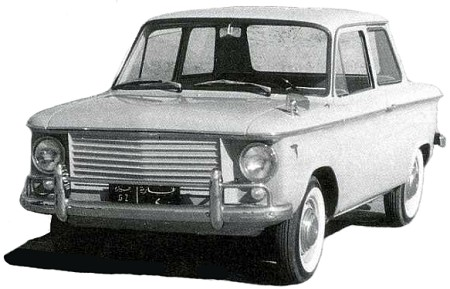 سيارة رمسيس المصرية